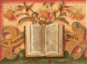 Blason de la chambre de rhétorique "Den Boeck" de Bruxelles. Devise : "Om beters wille".